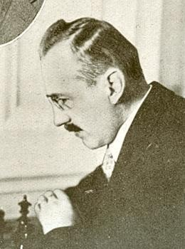 Dr. Karel Treybal, akouskouherský a později československý šachista